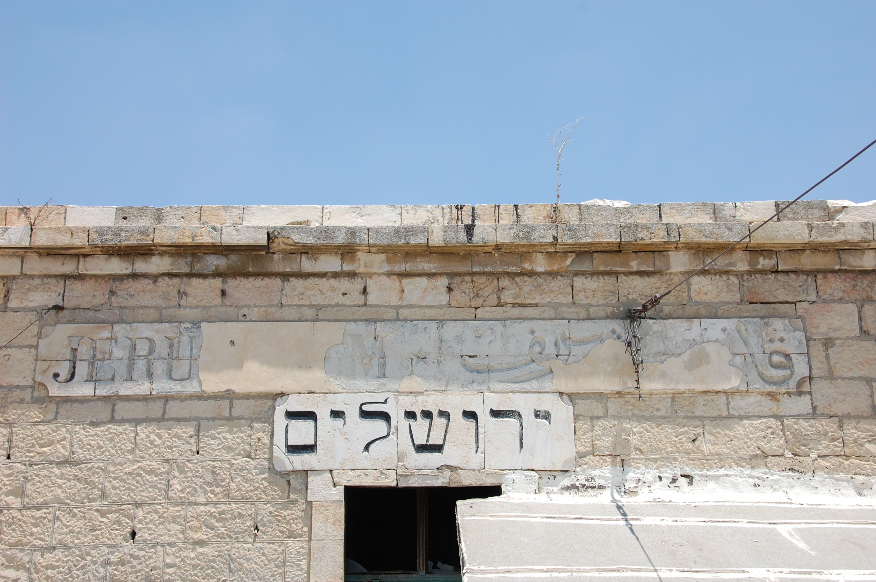 Jerusalem old rail station, 2007